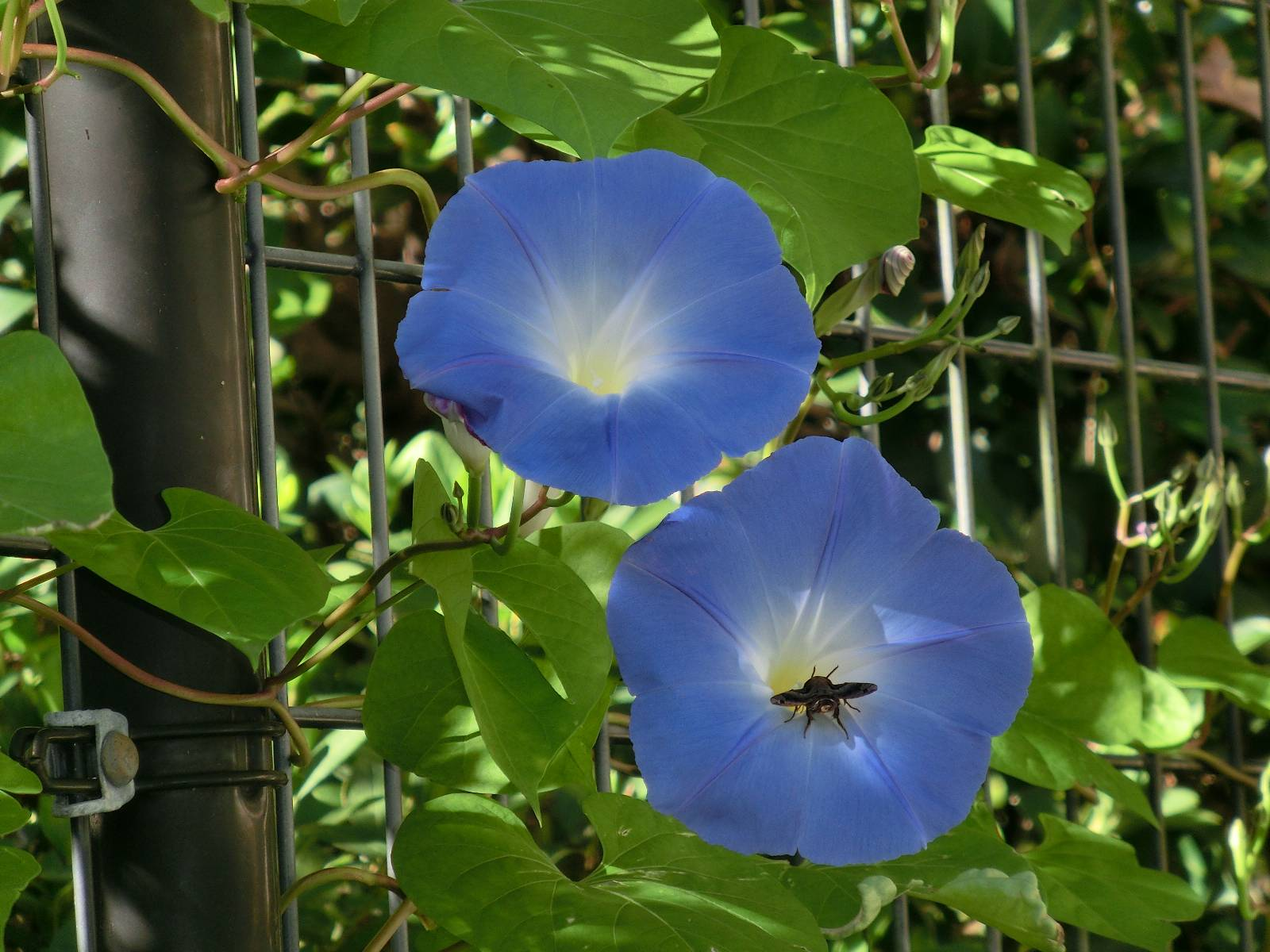 11月に咲いたヘヴンリーブルーと蜂